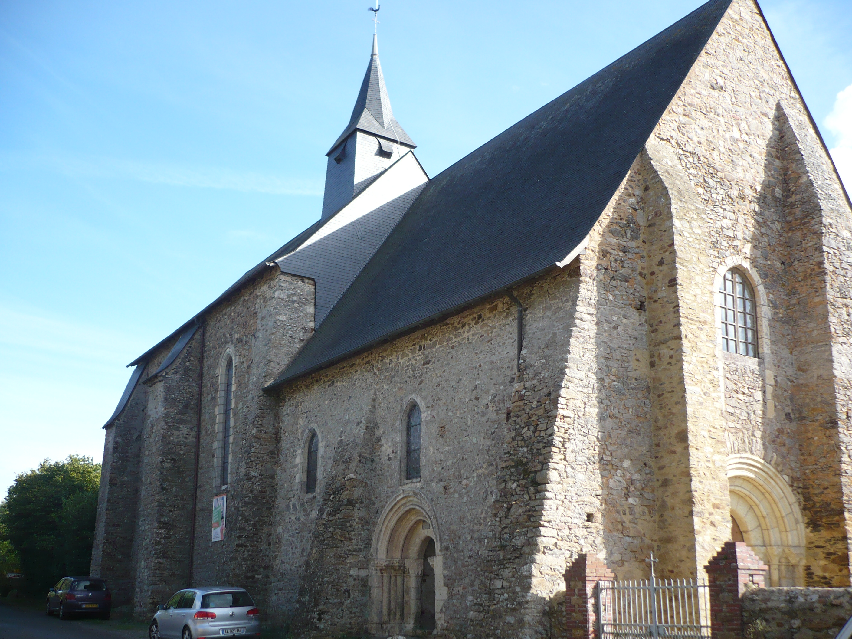 Louvaines - Eglise du Prieuré de la Jaillette - Vue extérieure